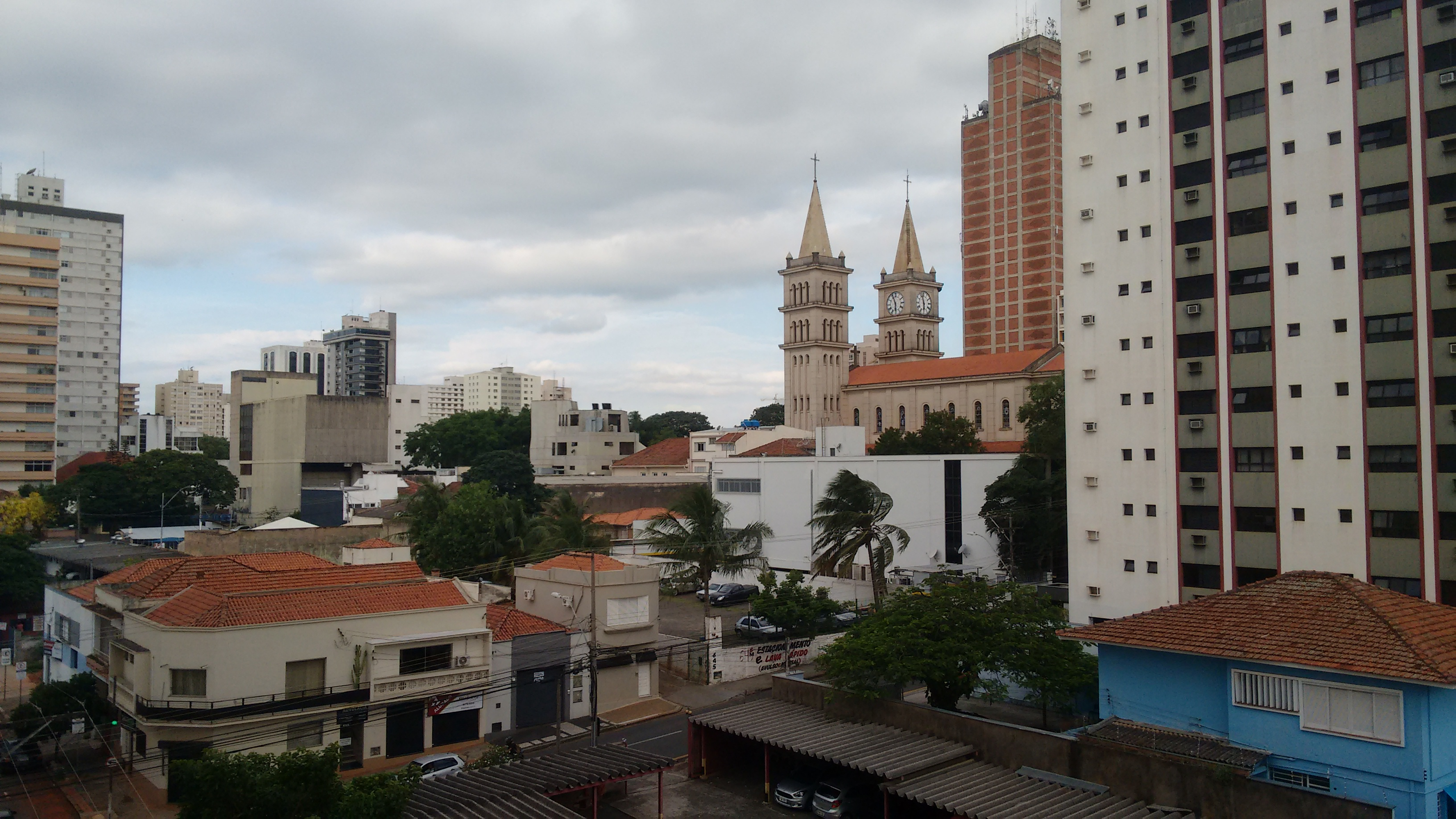 Vista panorâmica do centro de Piracicaba